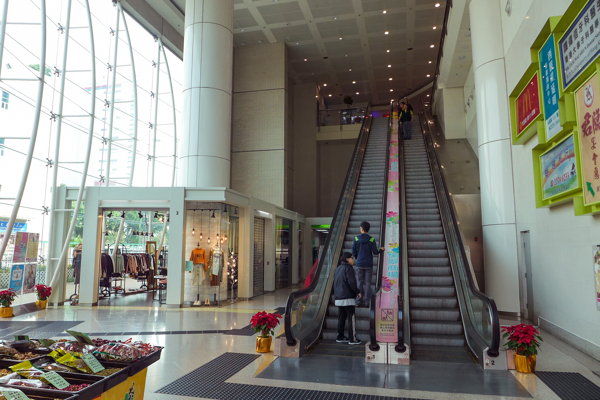 Yue Chui Shopping Centre Entrance Void